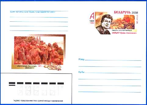 Конверт с оригинальной маркой Республики Беларусь 17 января 2008 г. 100 лет со дня рождения Зайцева Евгения Алексеевича. Иллюстрация: "Константин Заслонов" (фрагмент), 1957 г. (на бел. яз.). Репродукция картины, палитра с красками и кистями.